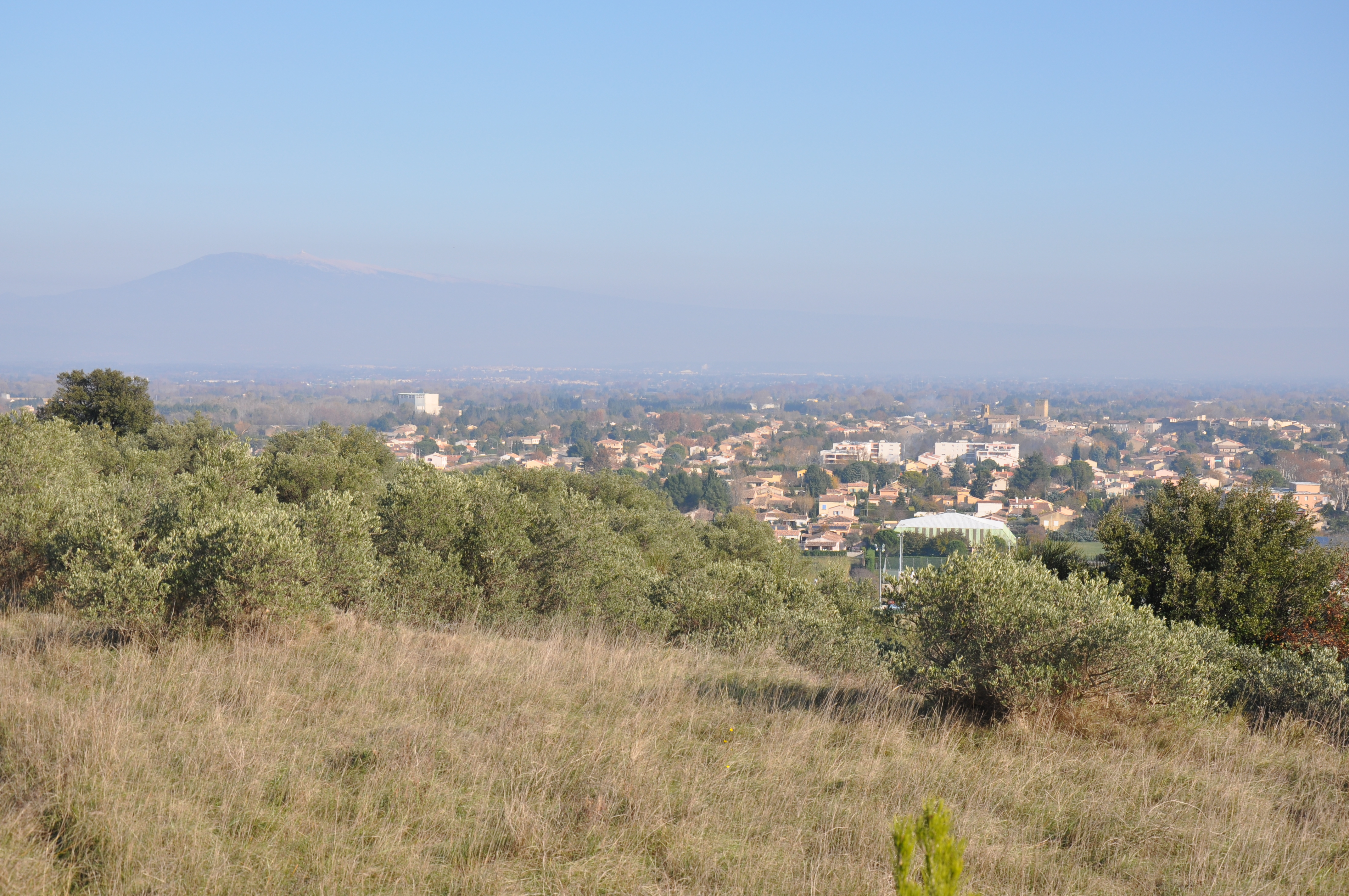 VUE DEPUIS SORGUES